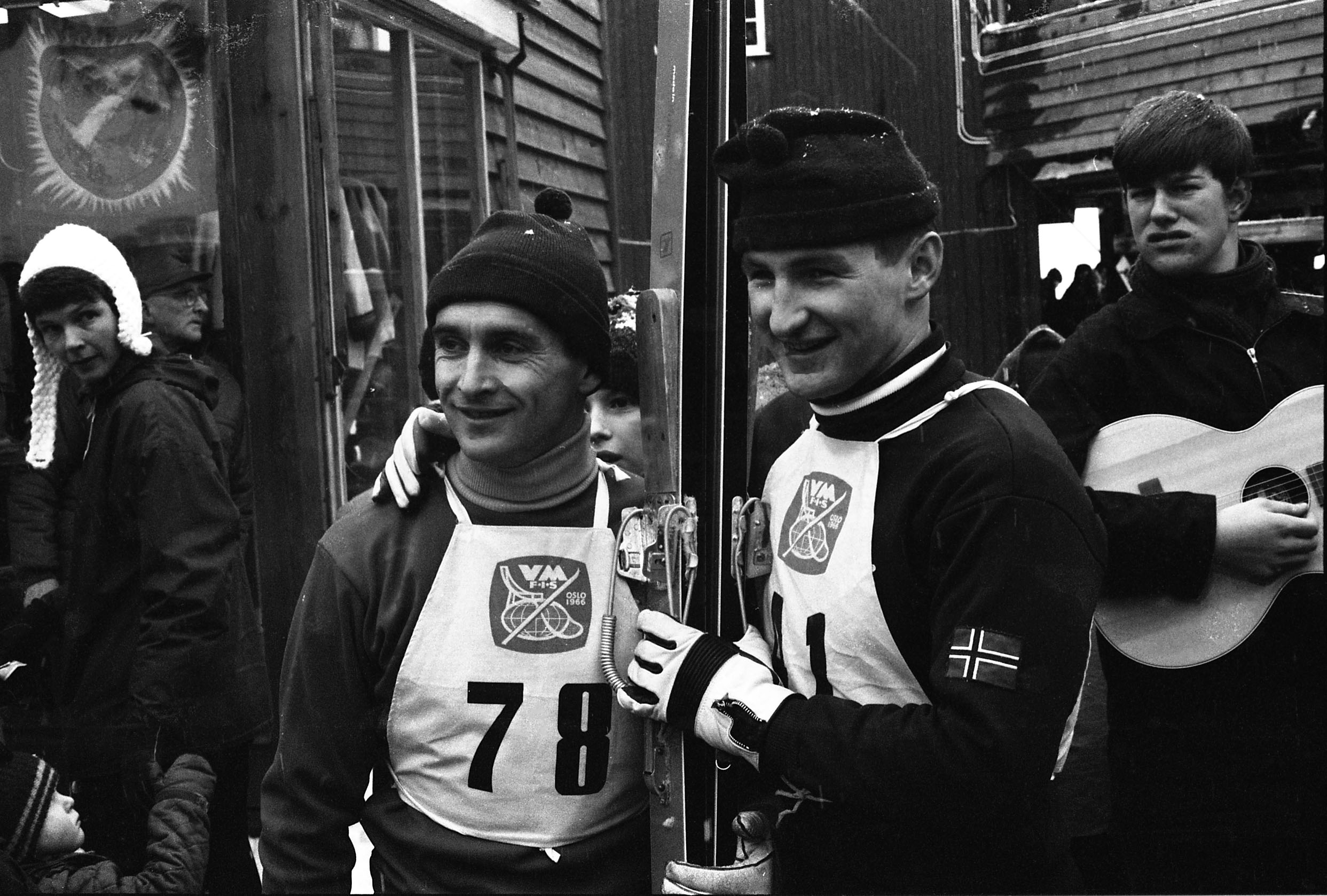 Bjørn Wirkola og Kjell Sjøberg, Verdensmesterskapet på ski i Oslo 1966. Arkivreferanse: RIKSARKIVET- RA/PA/0797/U/Ua/3894_Lasse_010